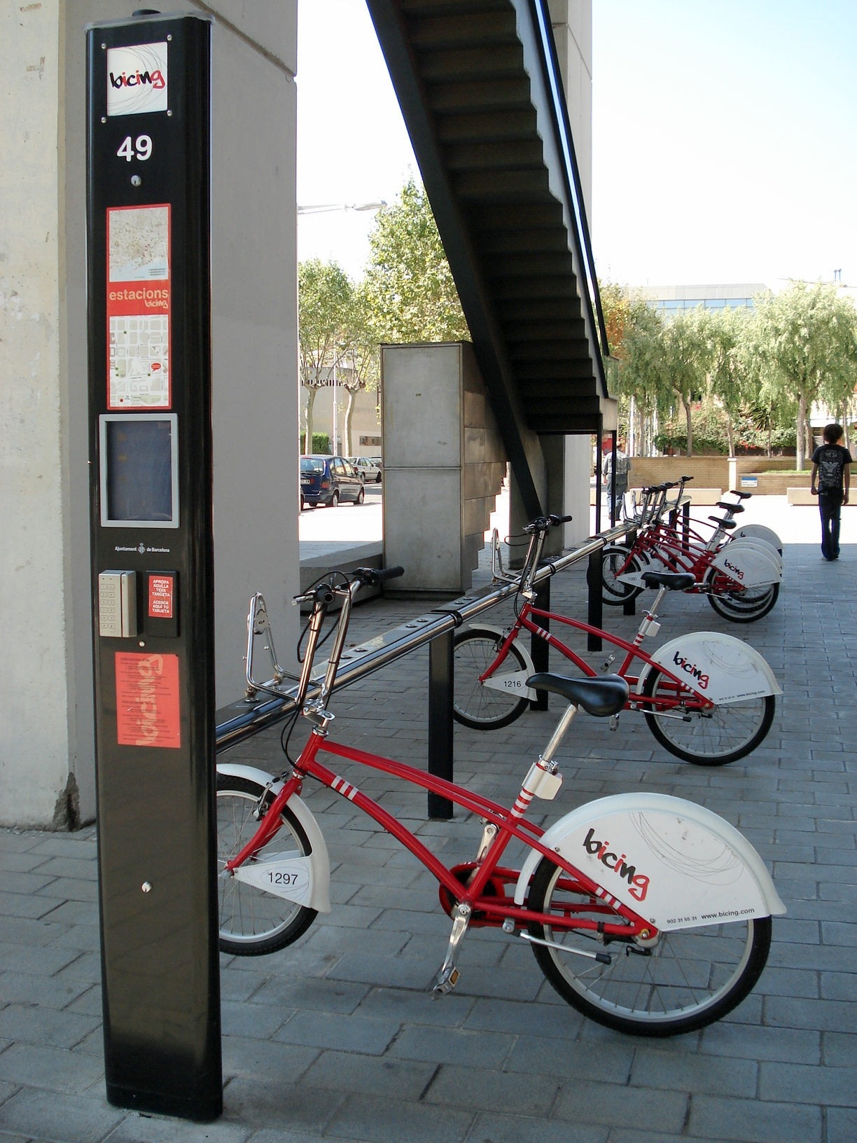 Estación Bicing Rosa Sensat en front 13-15